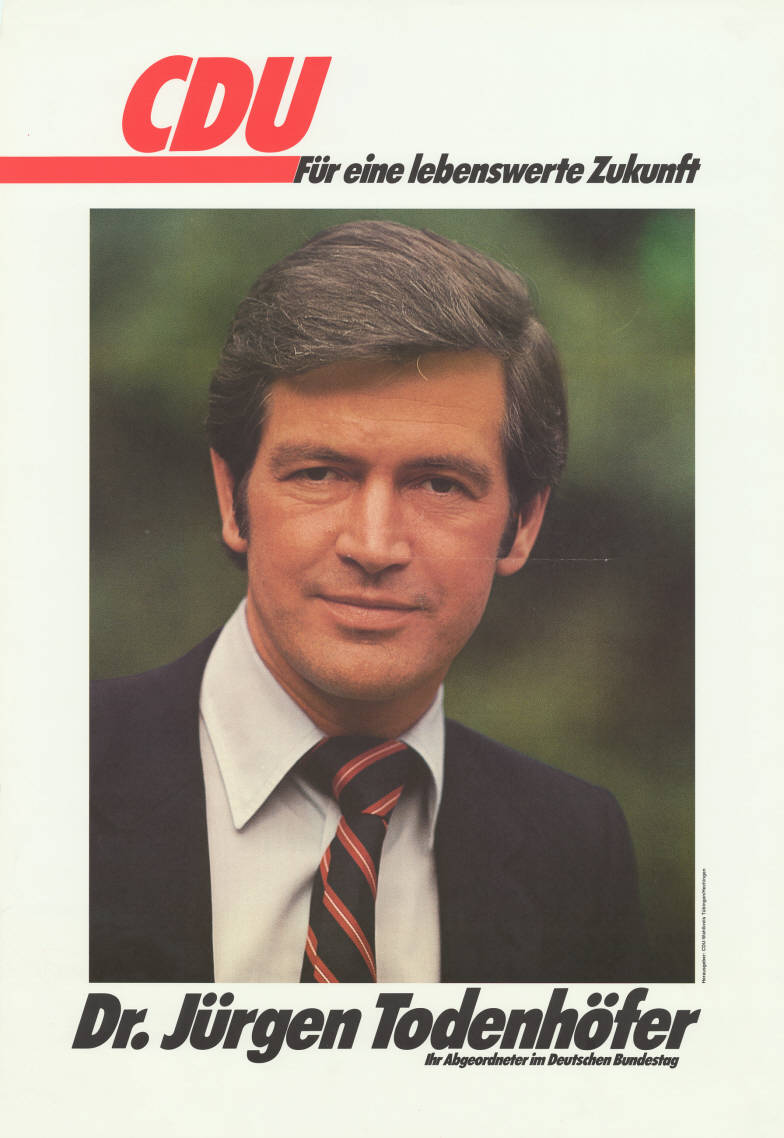 CDU Für eine lebenswerte Zukunft Dr. Jürgen Todenhöfer Ihr Abgeordneter im Deutschen Bundestag Abbildung: Porträtfoto Plakatart: Kandidaten-/Personenplakat mit Porträt Auftraggeber: CDU-Wahlkreis Tübingen/Hechingen Objekt-Signatur: 10-031 : 854 Bestand: CDU-Plakate (10-031) GliederungBestand10-18: Personenplakate Lizenz: KAS/ACDP 10-031 : 854 CC-BY-SA 3.0 DE